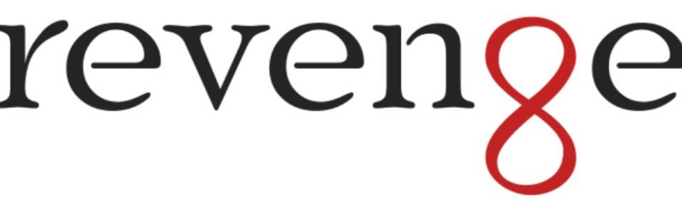 revenge logo